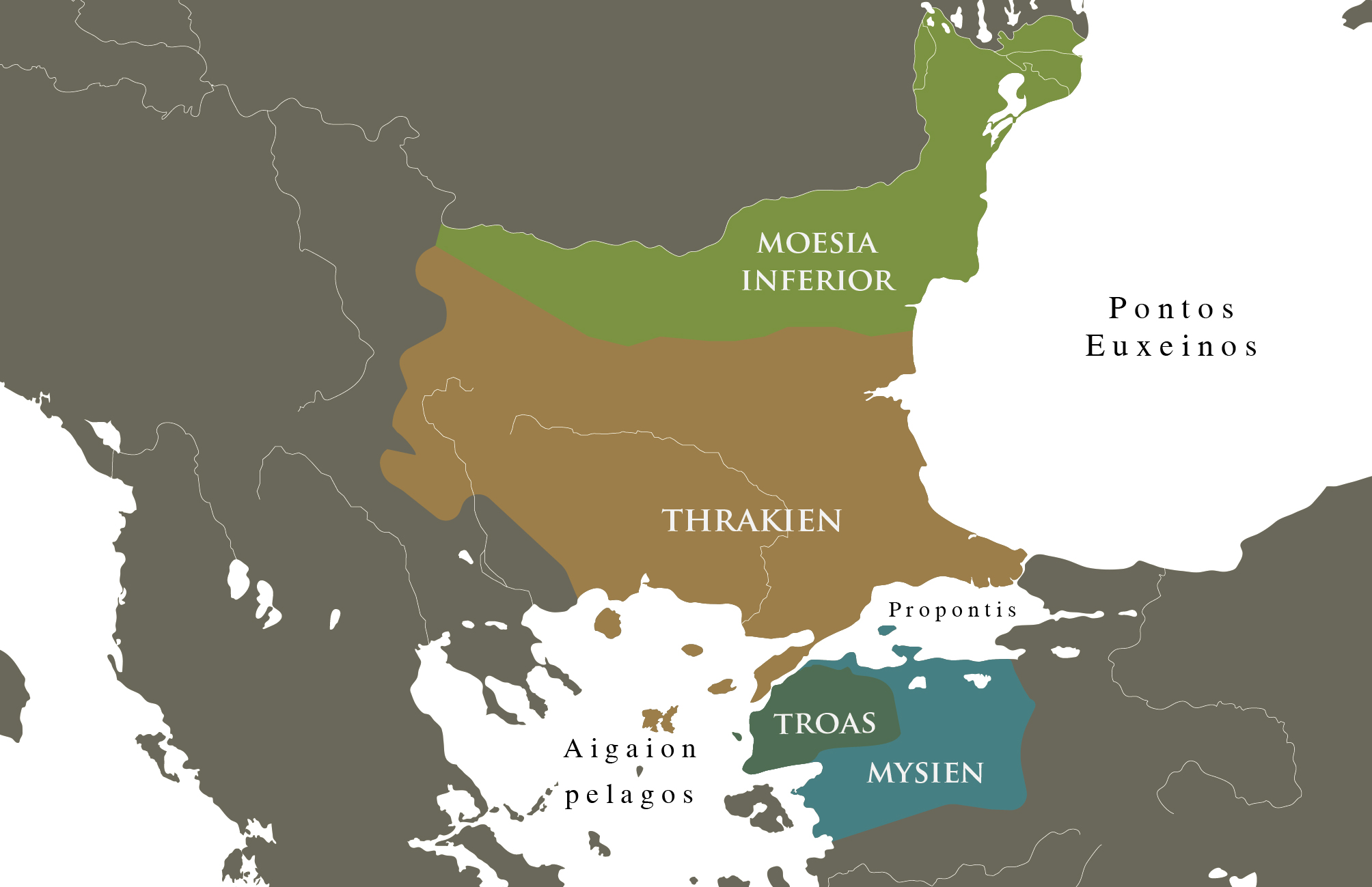 Karte des östlichen Mittelmeeraums und des Schwarzen Meers mit den antiken Landschaften, Thrakien, Mysien, Troas und Moesia inferior